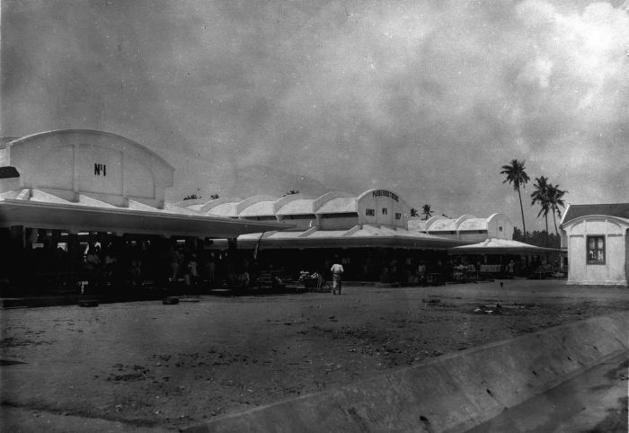 Foto. De Passar Boetoeng te Makassar, Celebes.